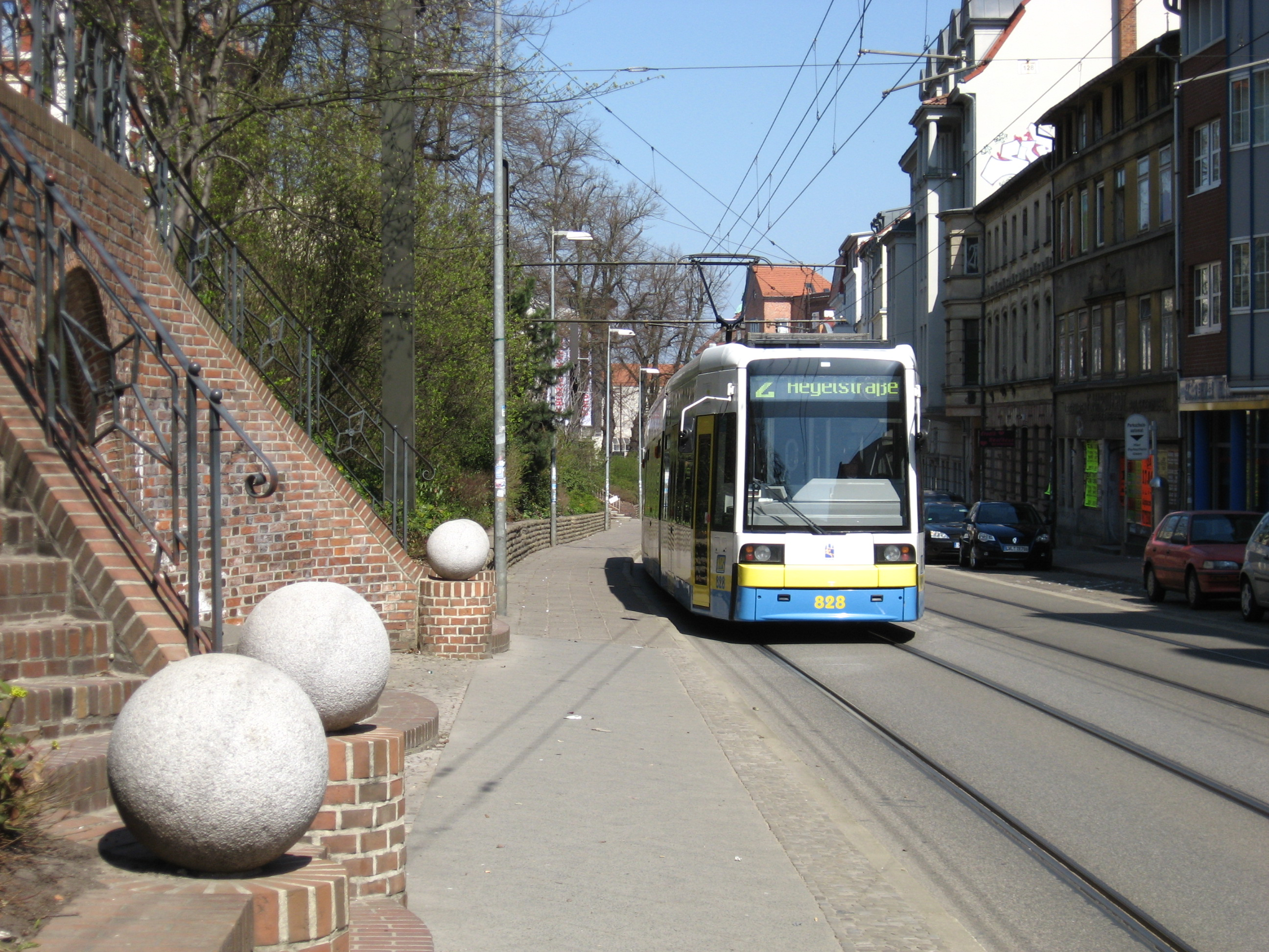 Trams in Schwerin